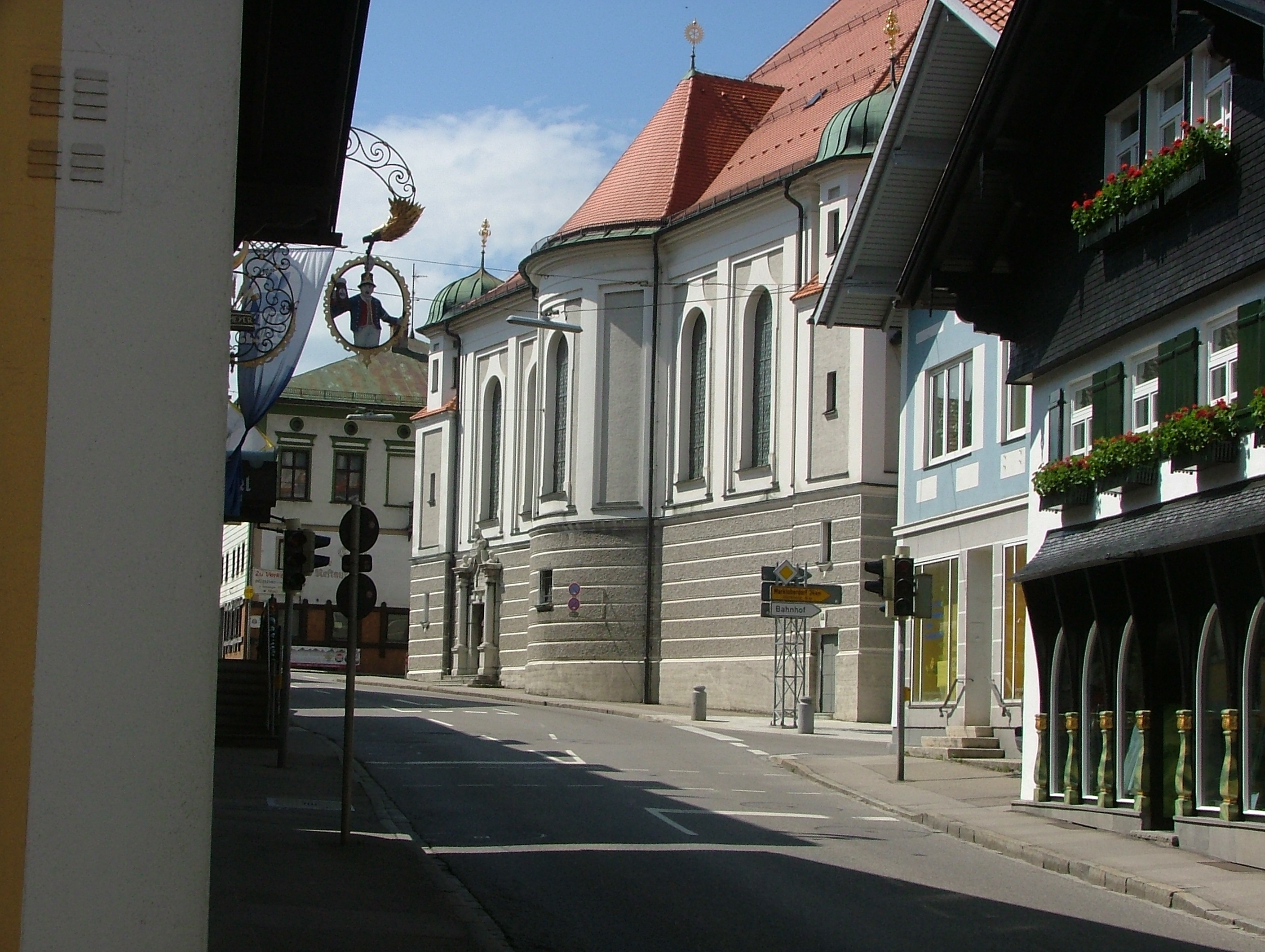 Nesselwang